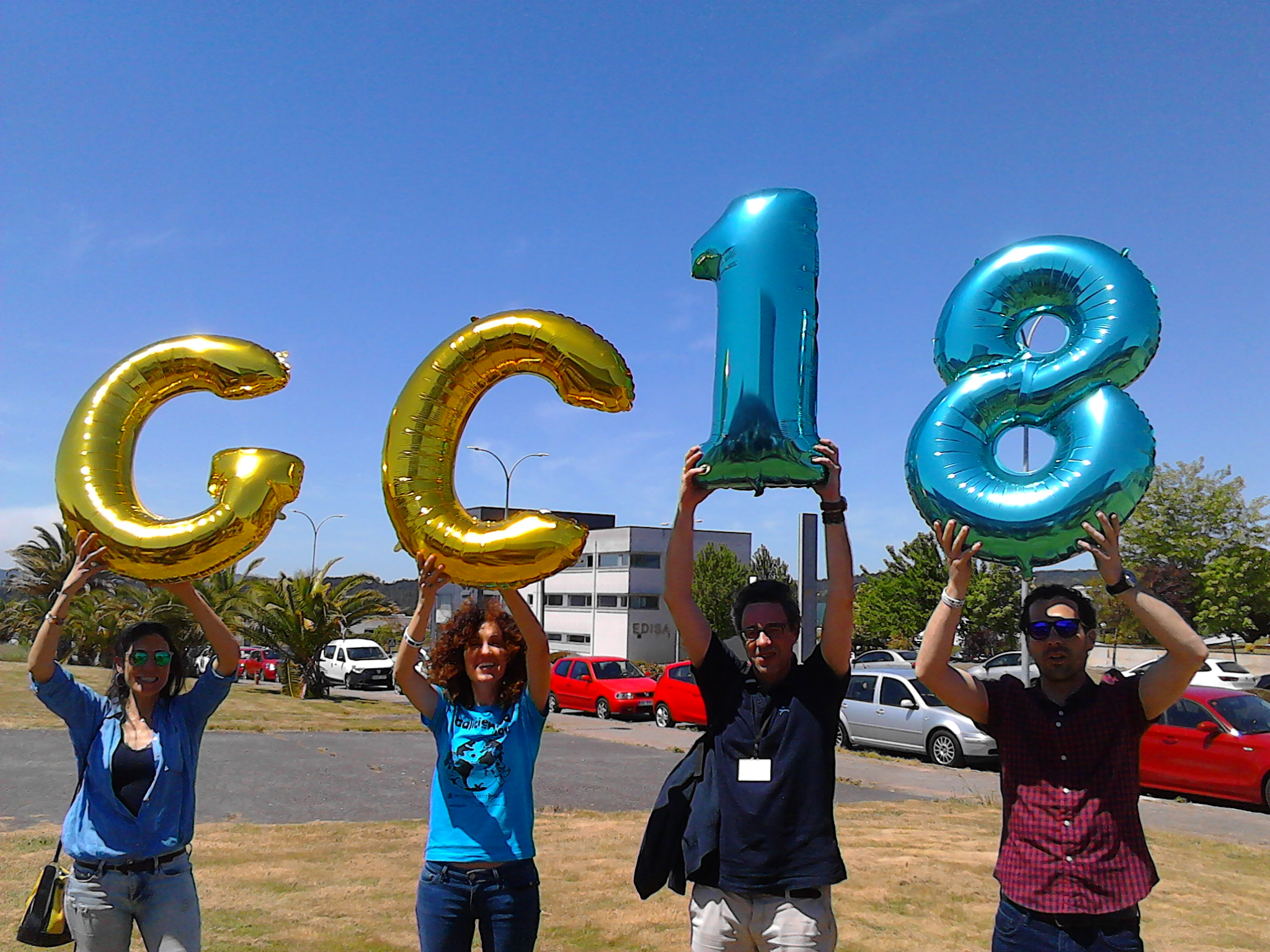 Momento de celebración na Galiciencia 2018